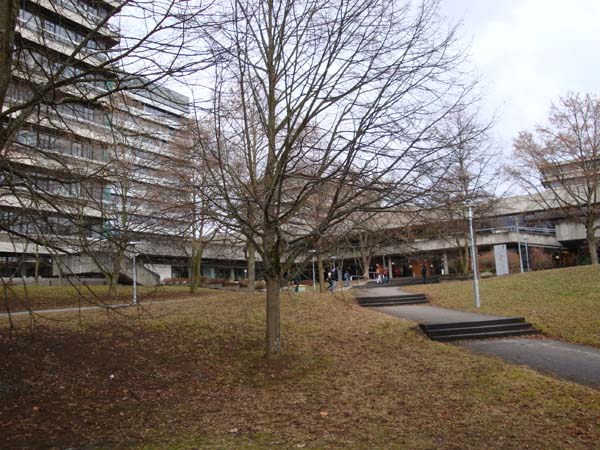 Hörsaalzentrum mit Chemiegebäude auf der Morgenstelle